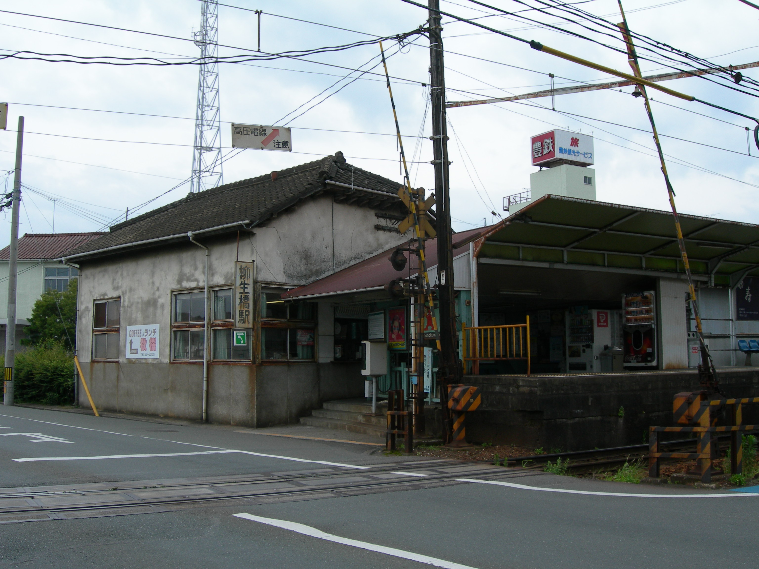 柳生橋駅